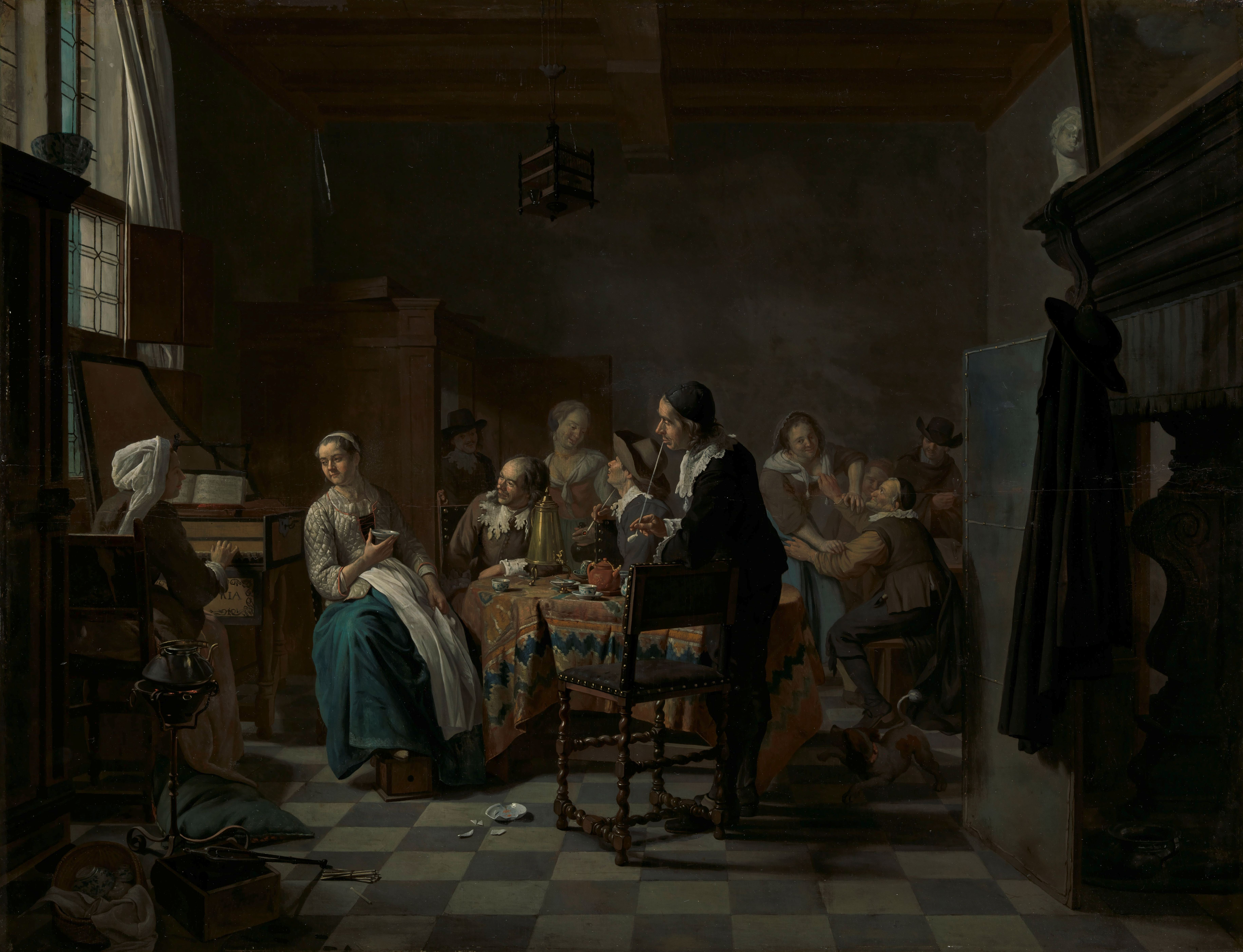 Interieur met een gezelschap rond de tafel, links een jonge vrouw die een lied uit liedboek speelt op een klavecimbel. Aan de tafel wordt thee gedronken, twee mannen roken pijpen. De vrouw links heeft een stoofje onder de voeten. Op de achtergrond vergrijpt een oude man zich aan een jonge vrouw. Rechts een scherm voor de schoorsteenmantel waaraan een jas en een hoed hangen. Aan het plafond hangt een vogelkooi.